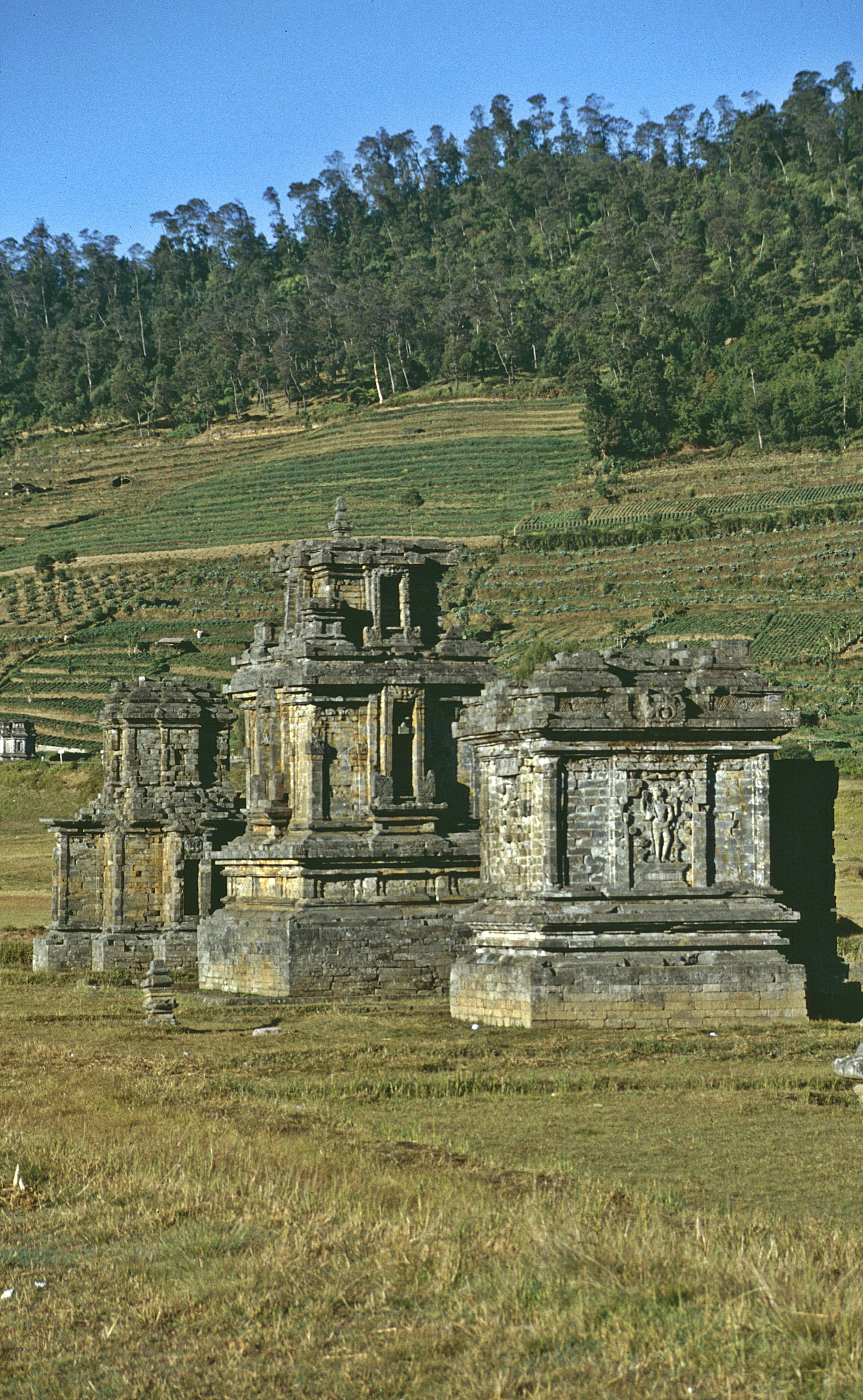 Dieng Plateau: Tempel der Arjuna-Gruppe